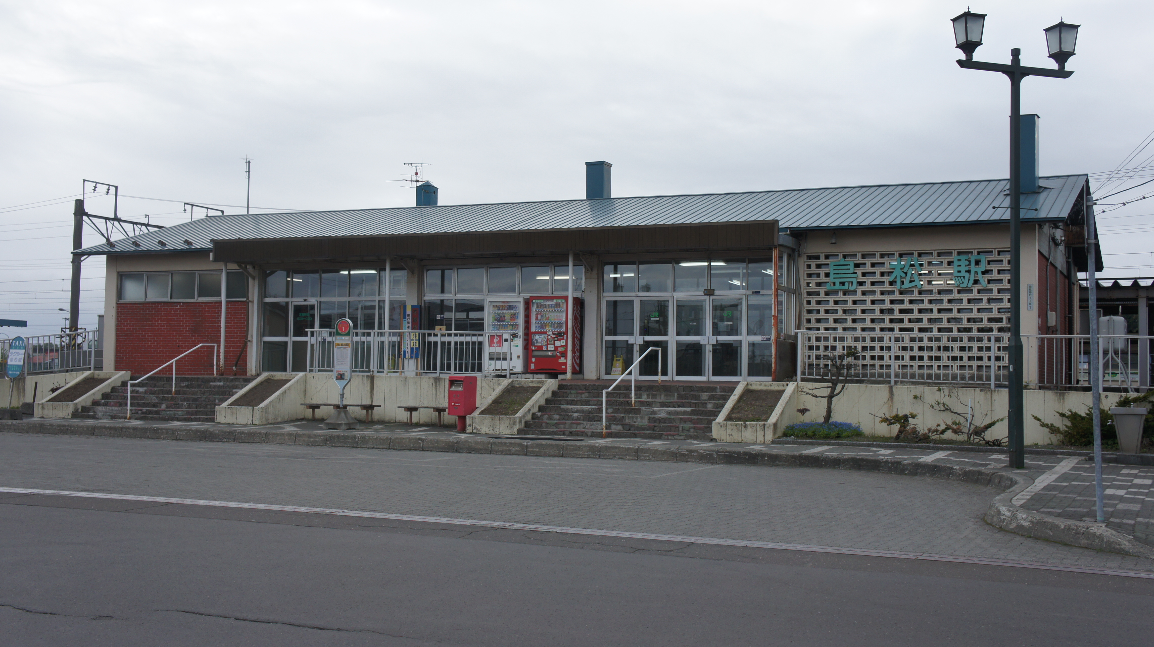 JR千歳線・島松駅の駅舎 Sony NEX-3